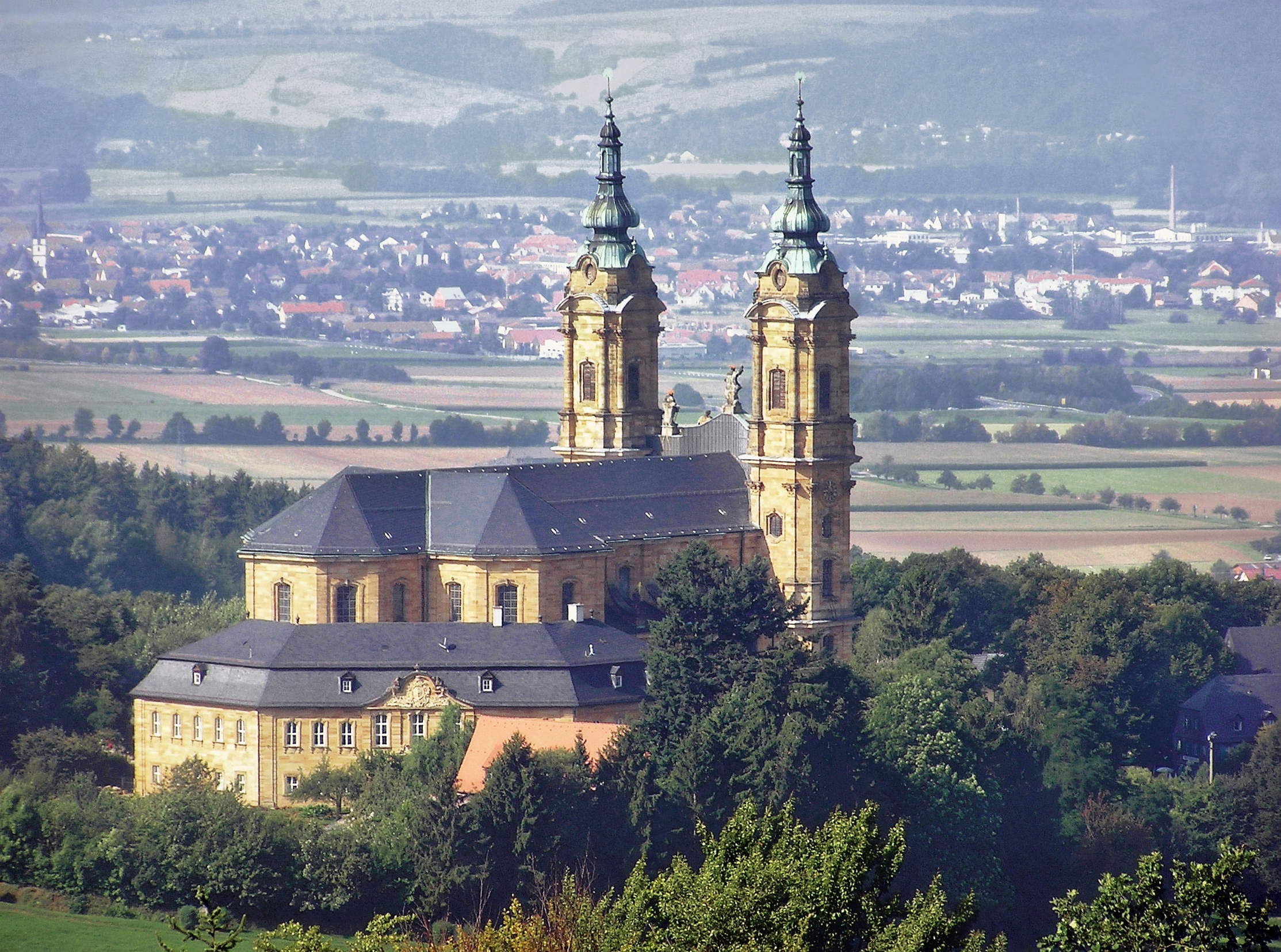 Wallfahrtskirche Vierzehnheiligen